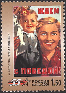 Почтовая марка России